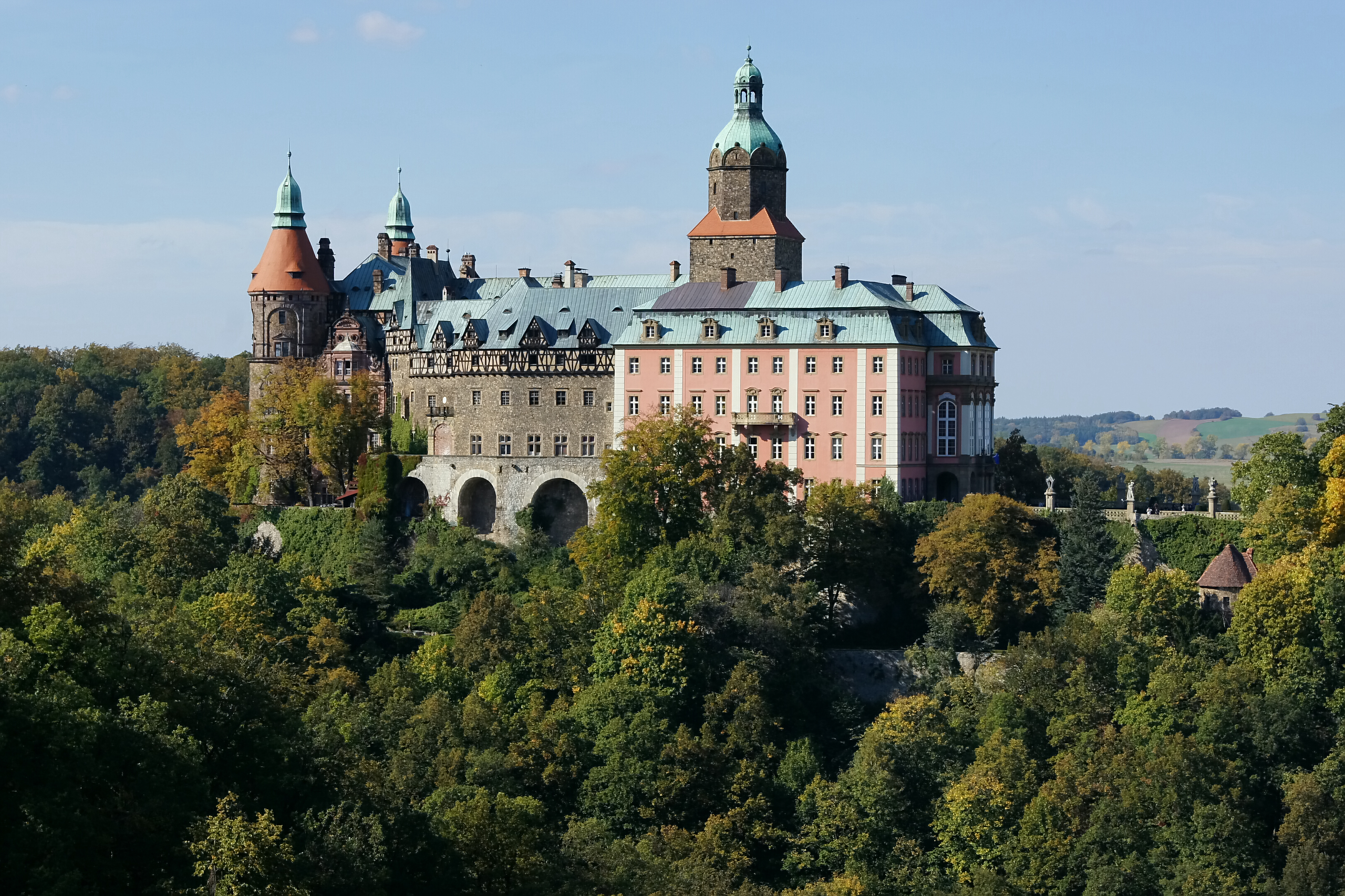 Zamek Książ widziany z punktu widokowego w Książański Parku Krajobrazowym.